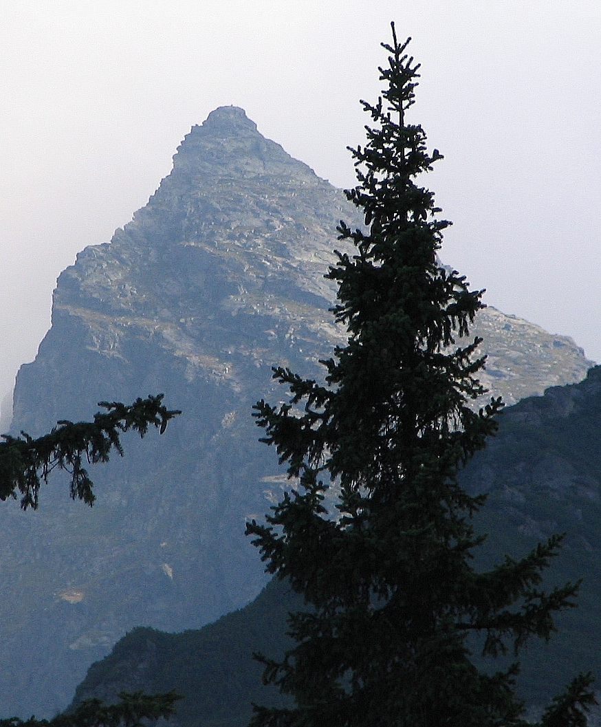 Widok na Kościelec z Hali Gąsienicowej